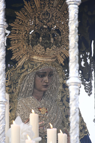 Virgen de Guadalupe. Semana Santa en Sevilla. Año 2006 Foto realizada y propiedad de Ángel Cachón